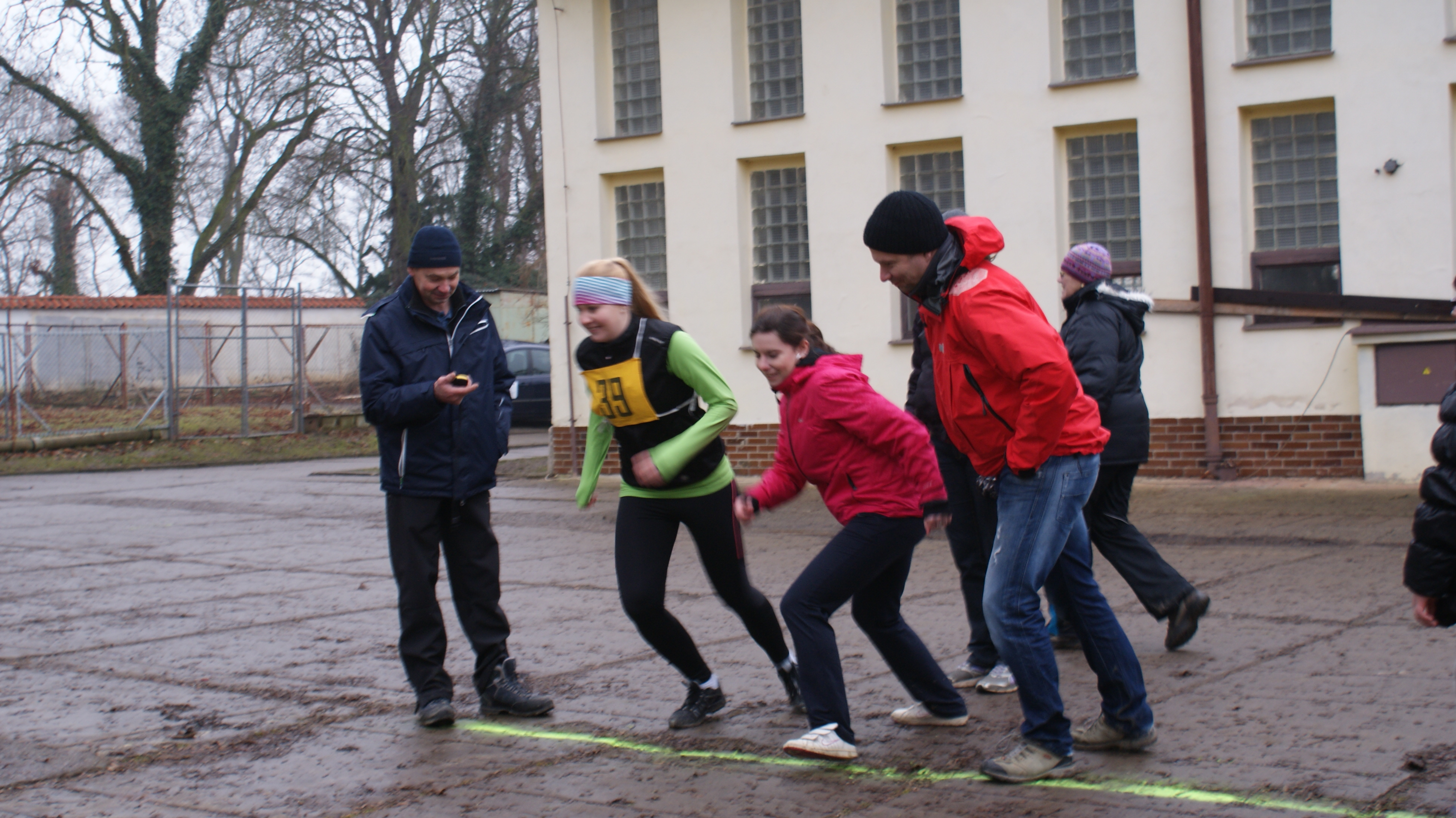 Zimní běh Litní - start rodinného závodu 18. 1. 2014